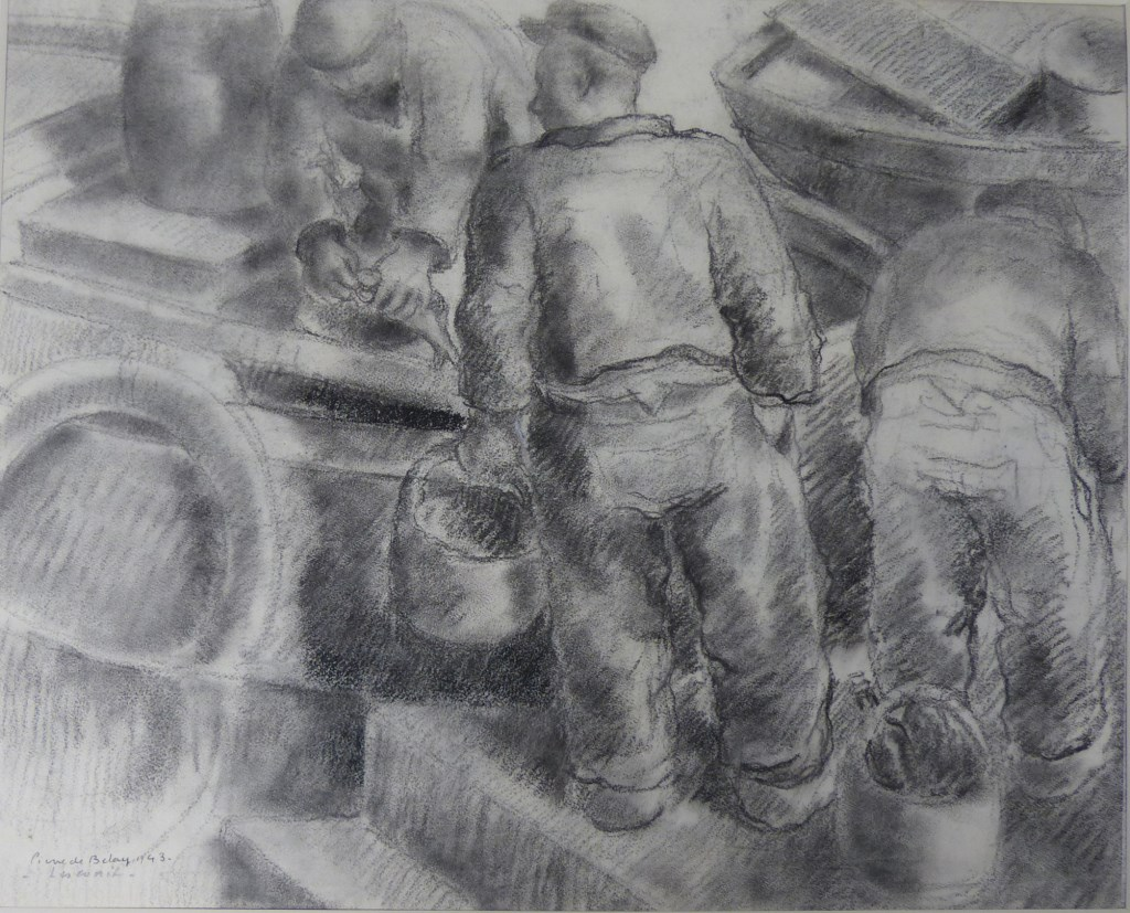 H. x L. : 50,2 x 65 cm